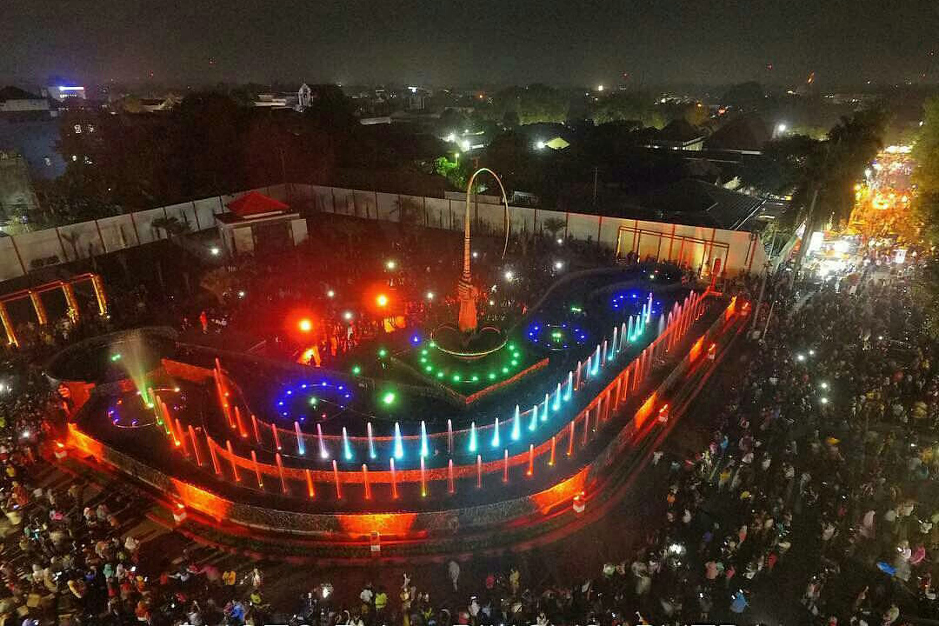 Kota Blitar